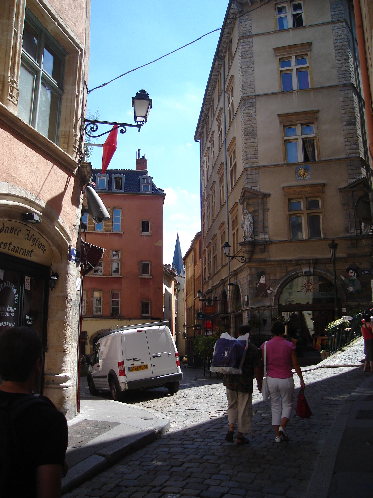 Quartier St Georges au loin